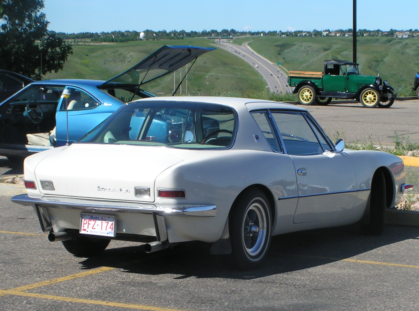 Avanti